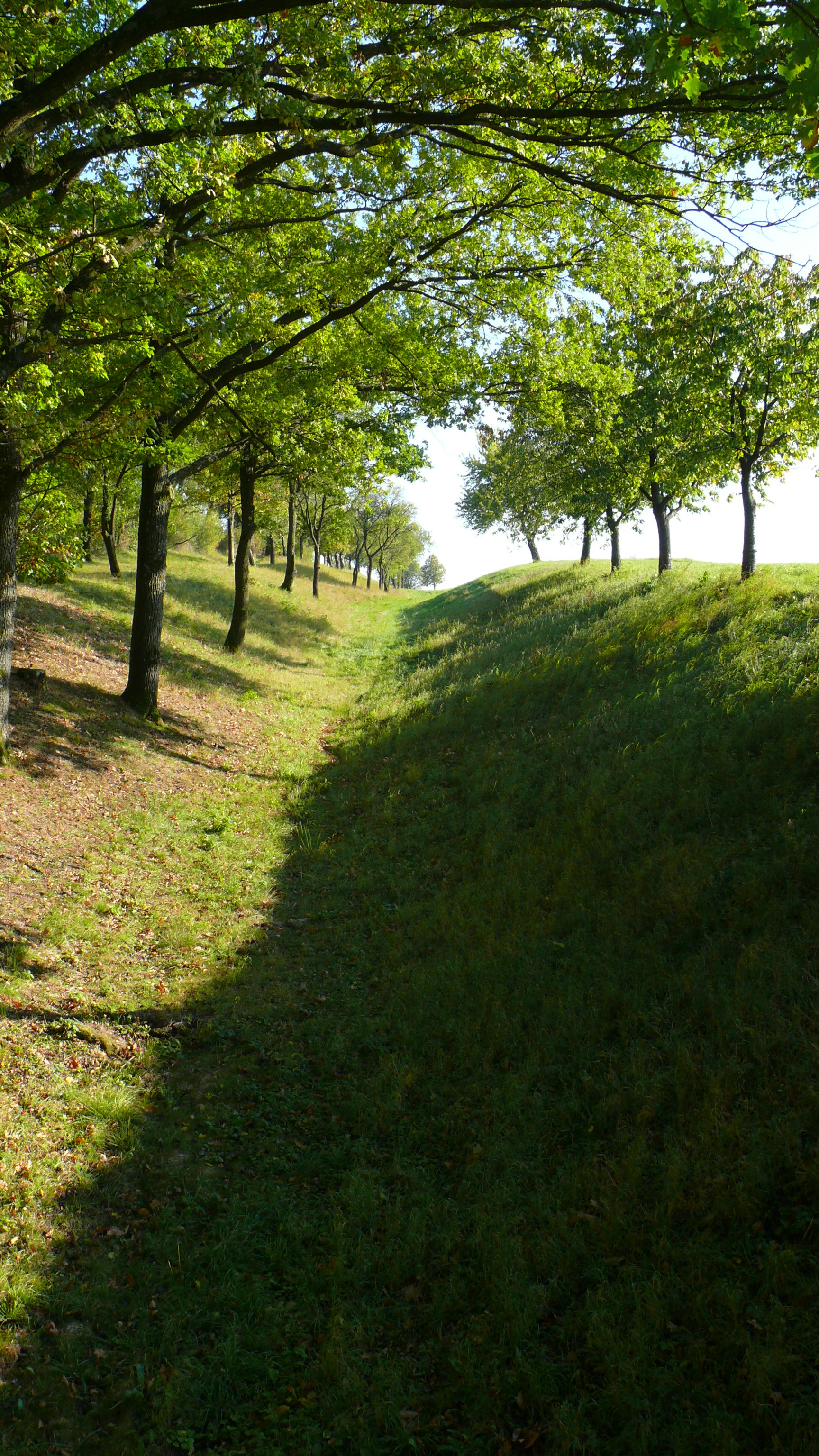 Wallsegment um das Oppidum Finsterlohr